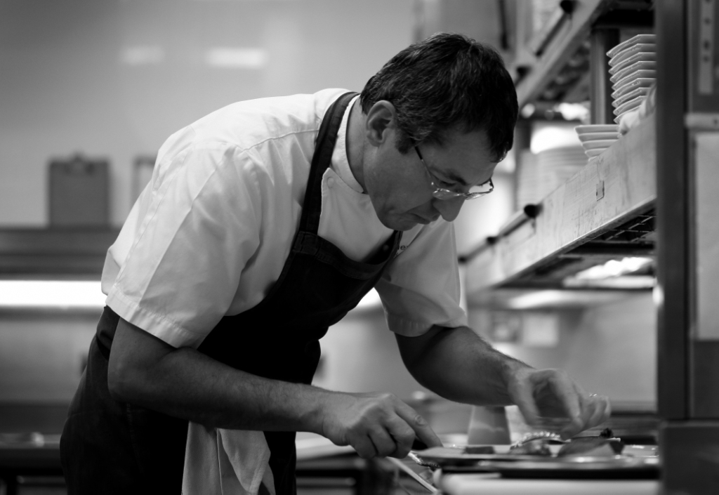 Daniel Galmiche en cuisine